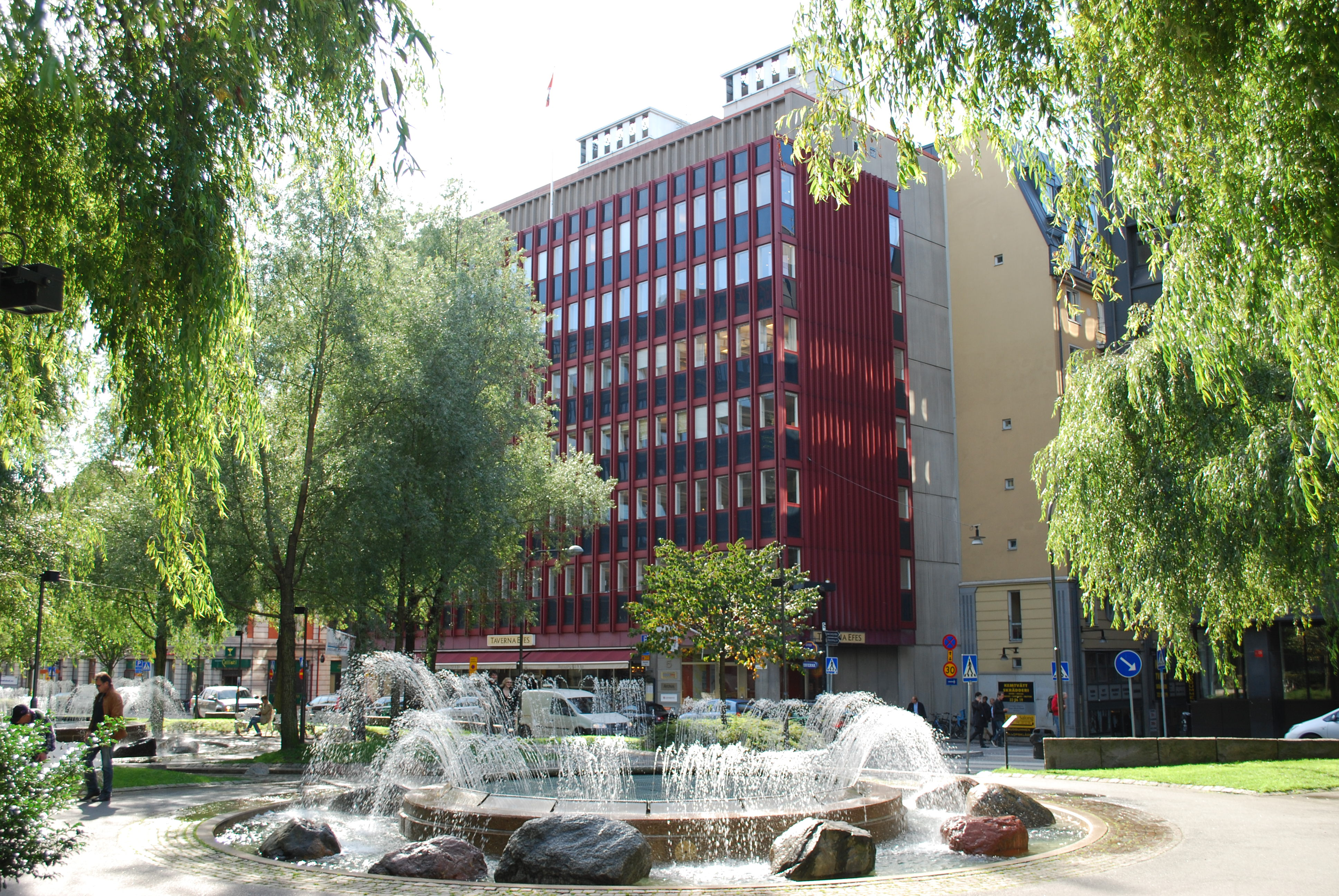 Brungebergstorg 1-5, Wahrenberg 10